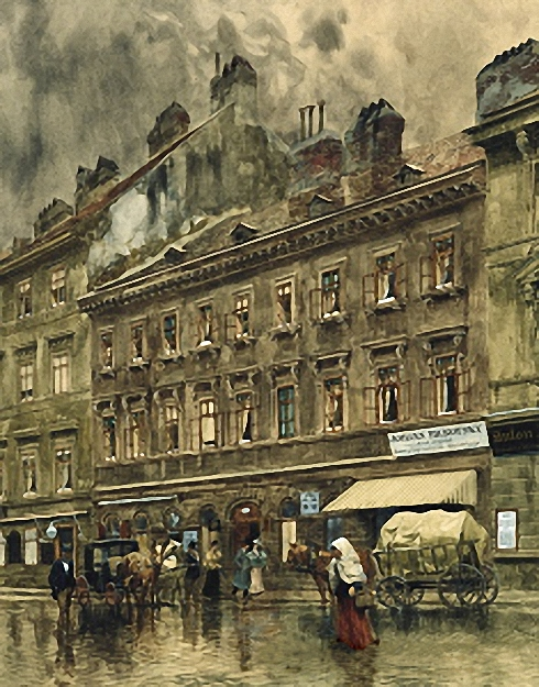 Schuberts Sterbehaus, Aquarell von F. Kopallick